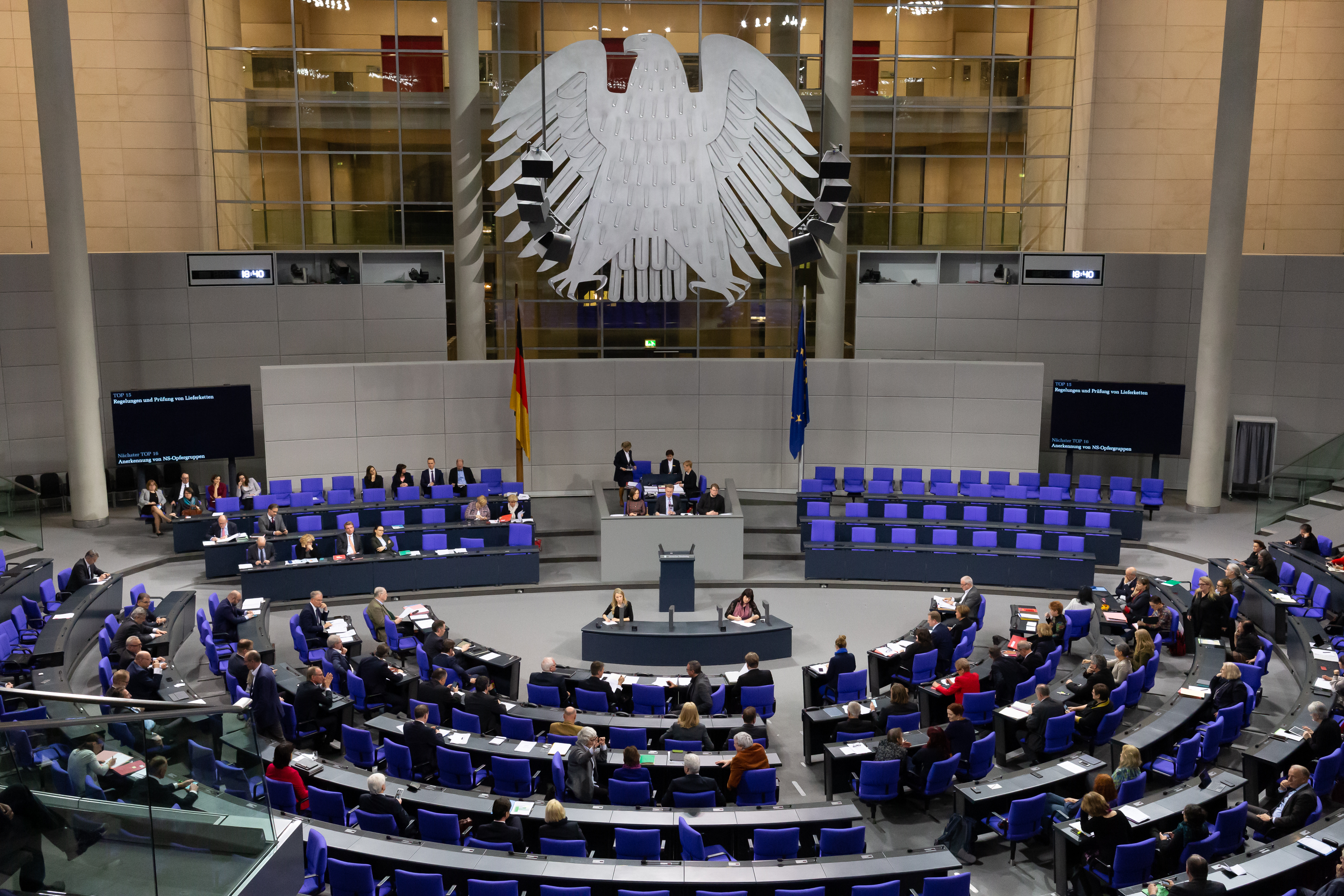 Deutscher Bundestag; Blick in den Plenarsaal